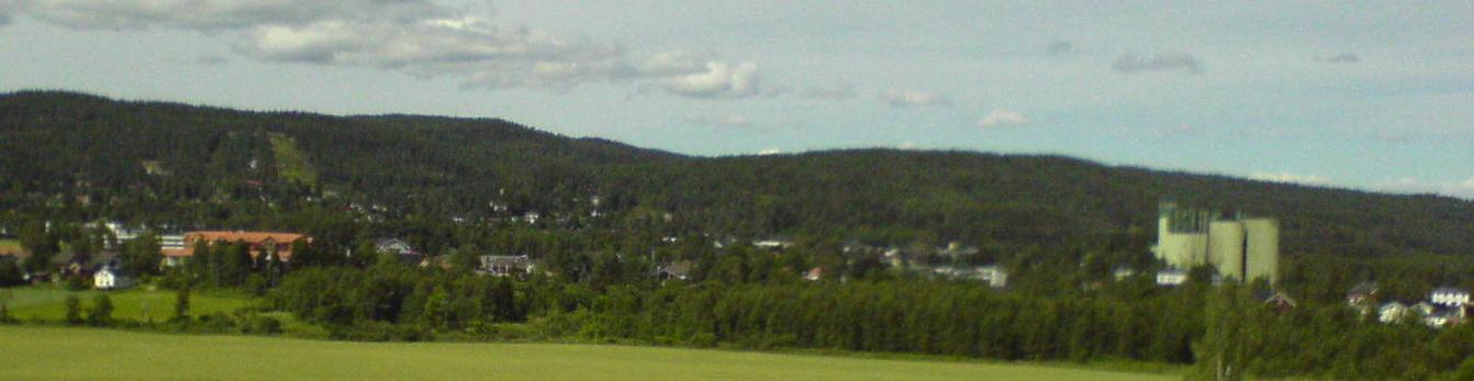 Bjørkelangen_sett_fra_Eidslia